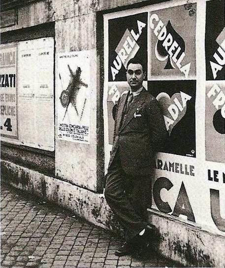 Pietro Maria Bardi na Itália